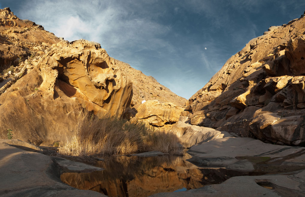 Las peñitas, Parque rural de Bentancuria.